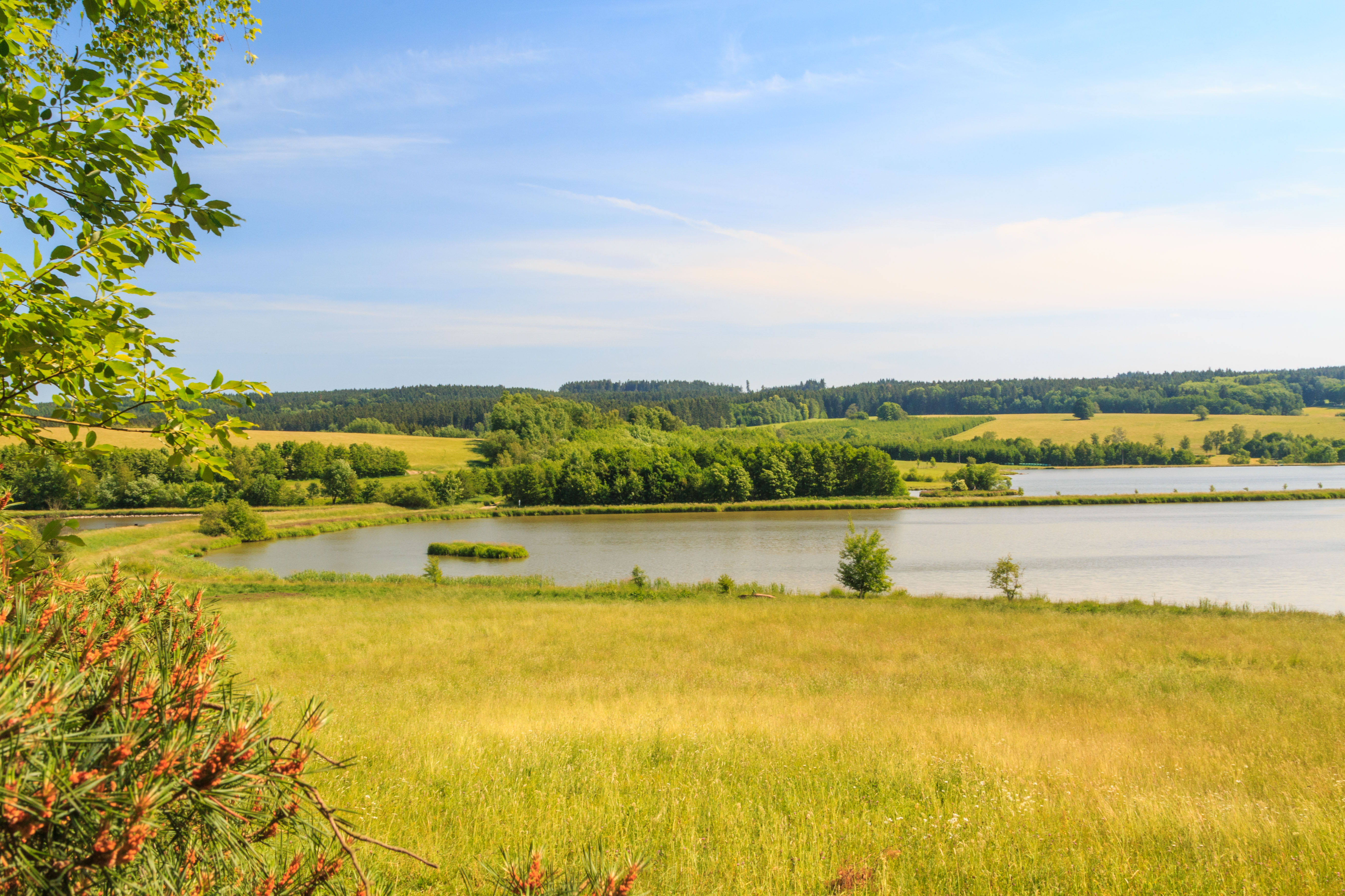 Rybník Osika Project: Vodstvo.